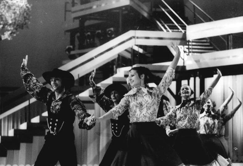 ADN-ZB Spremberg-23.4.76 Berlin: Festlicher Galaabend zur Eröffnung des Palastes der Republik Mit dem "Tanz der Zimmerleute und Bauarbeiter", vorgetragen vom Staatlichen Folklore-Ensemble der DDR, "Dankeschön" übermittelt. Zahlreiche bekannte Künstler gestalteten am 23.4.76 die feierliche Eröffnung des Palastes der Republik in Berlin mit einem festlichen Galaabend. Achtung: Foto von der Generalprobe!